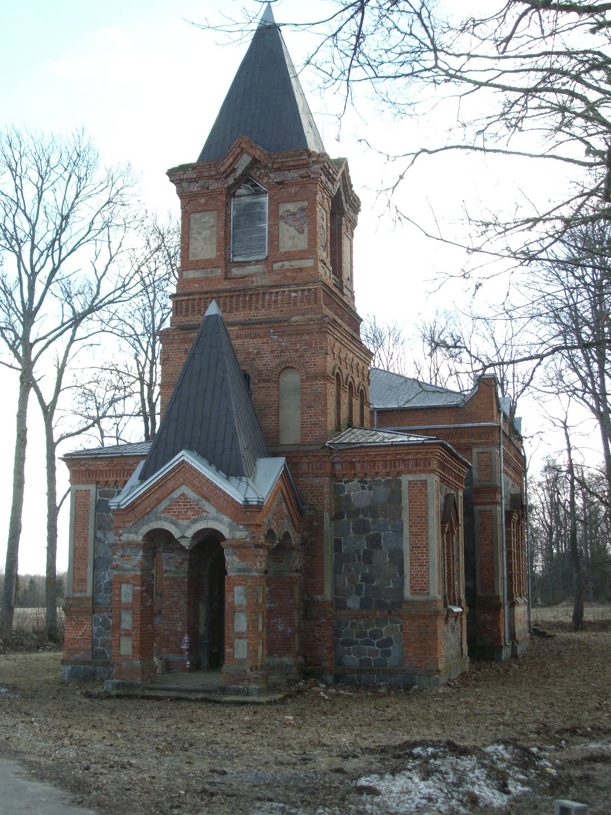 Tänassilma õigeusu kirik